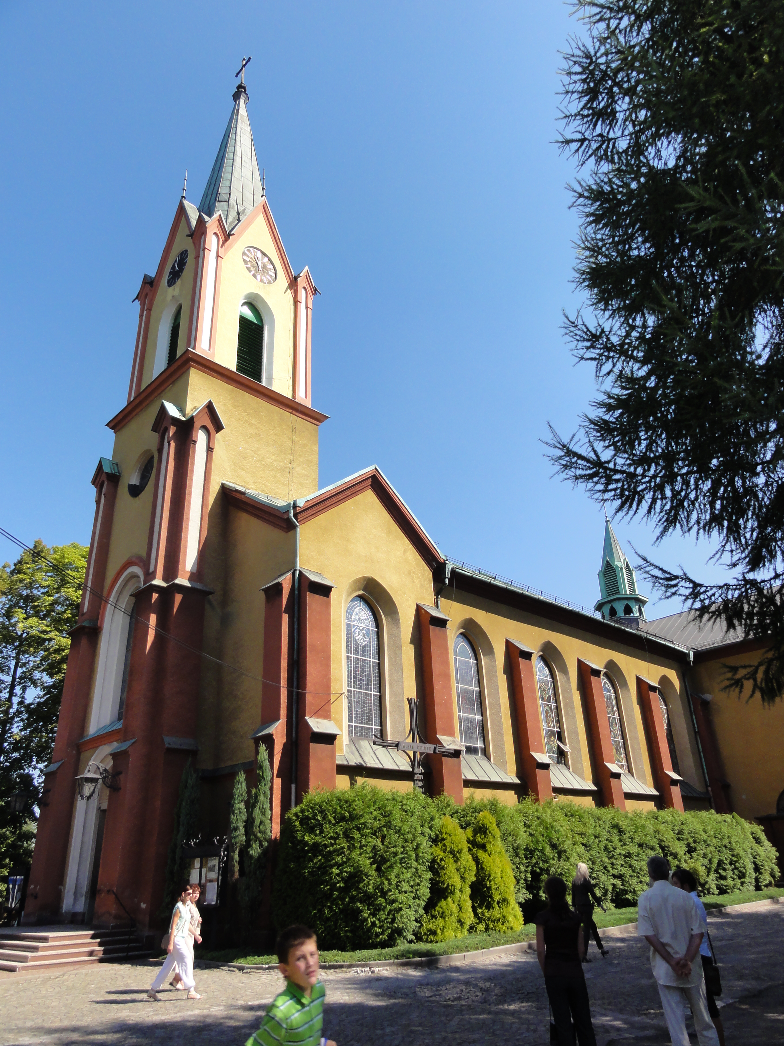 Kościół NMP Wspomożenia Wiernych w Czechowicach-Dziedzicach